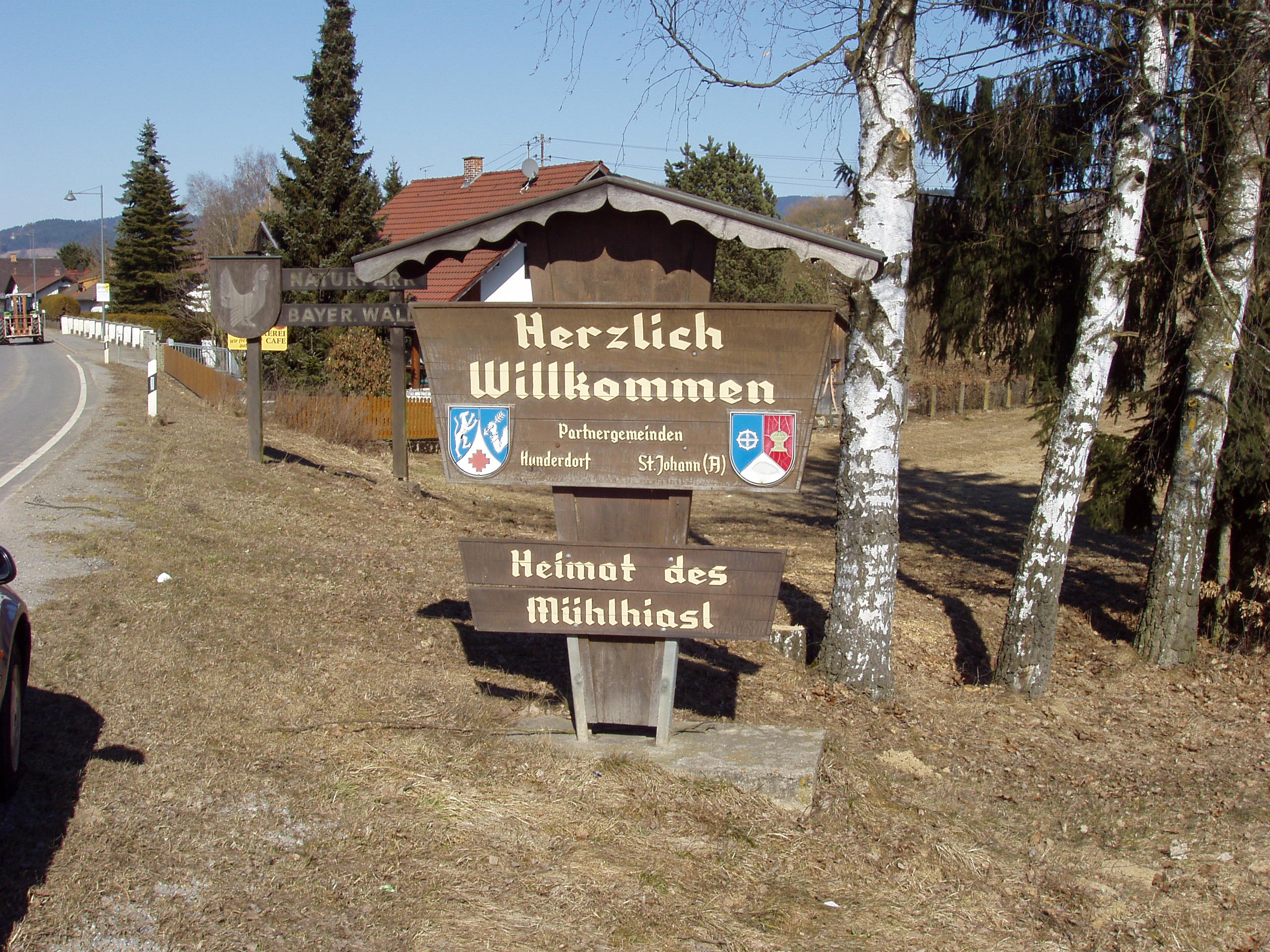 Gedenktafel Mühlhiasl beim Ortseingang Hunderdorf